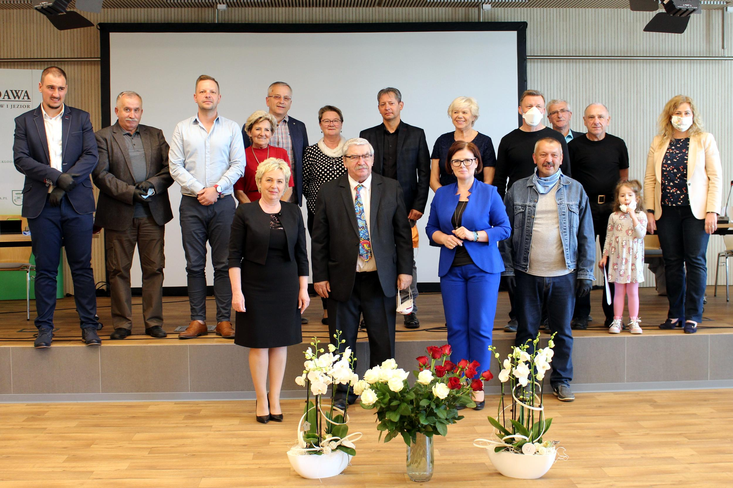 Radni Gminy Kłodawa (kadencja 2018-2023). Pierwsza od lewej w dolnym rzędzie wójt Gminy, trzecia od lewej skarbnik Gminy.